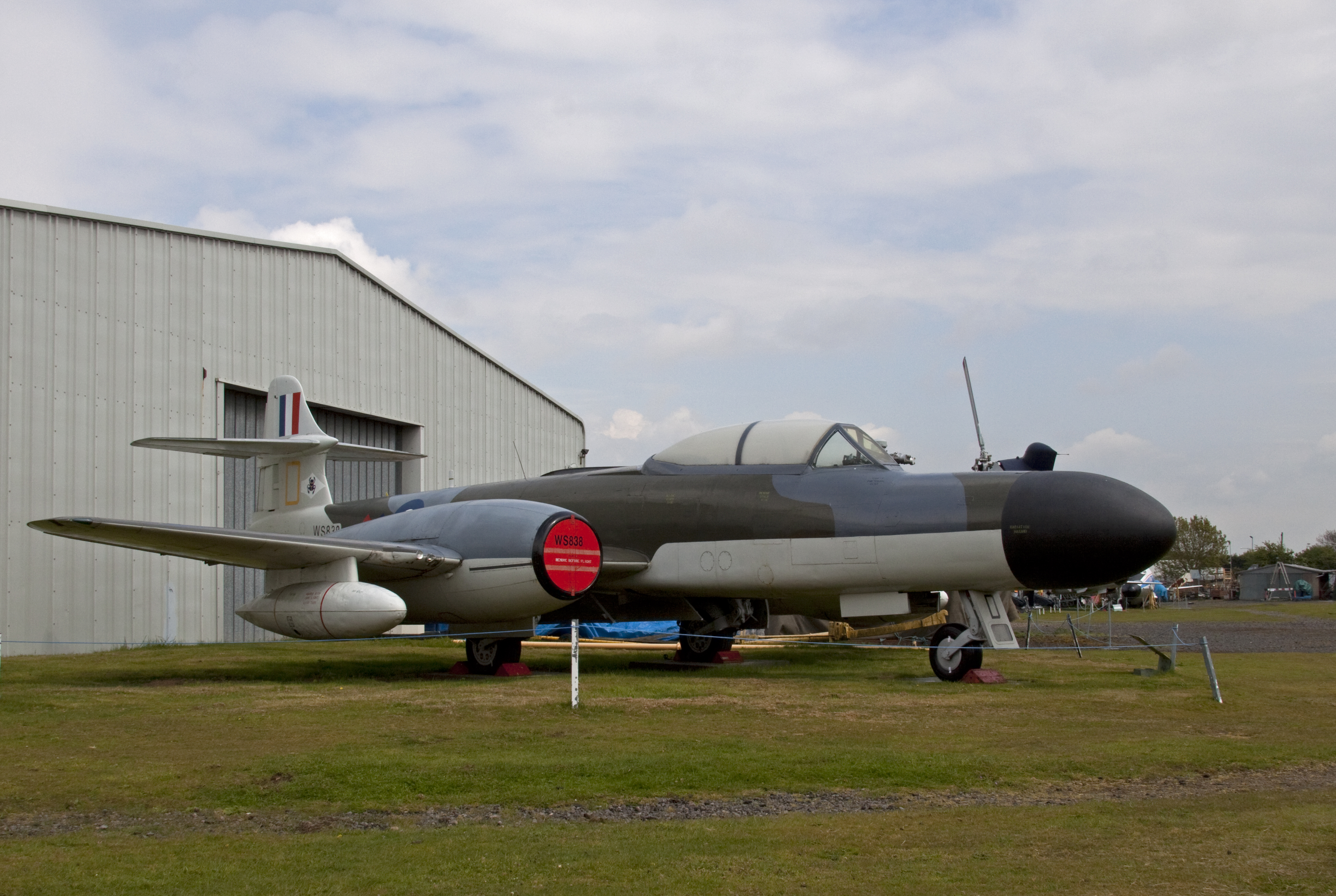 Gloster Meteor NF14